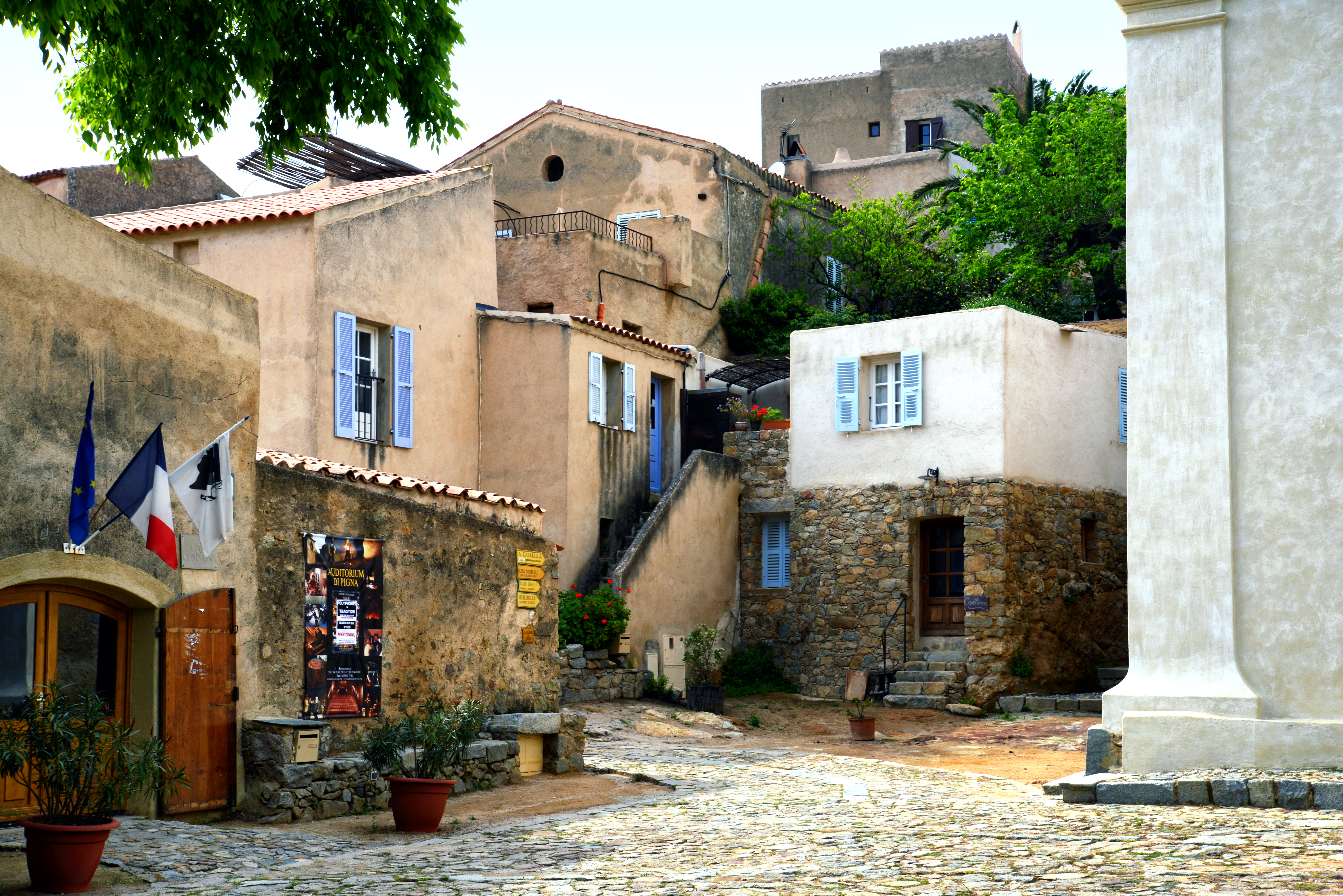 Pigna, Balagne (Corse) - Sur la Piazza di a Chjesa, entre l'église de l'Immaculée Conception et la Mairie